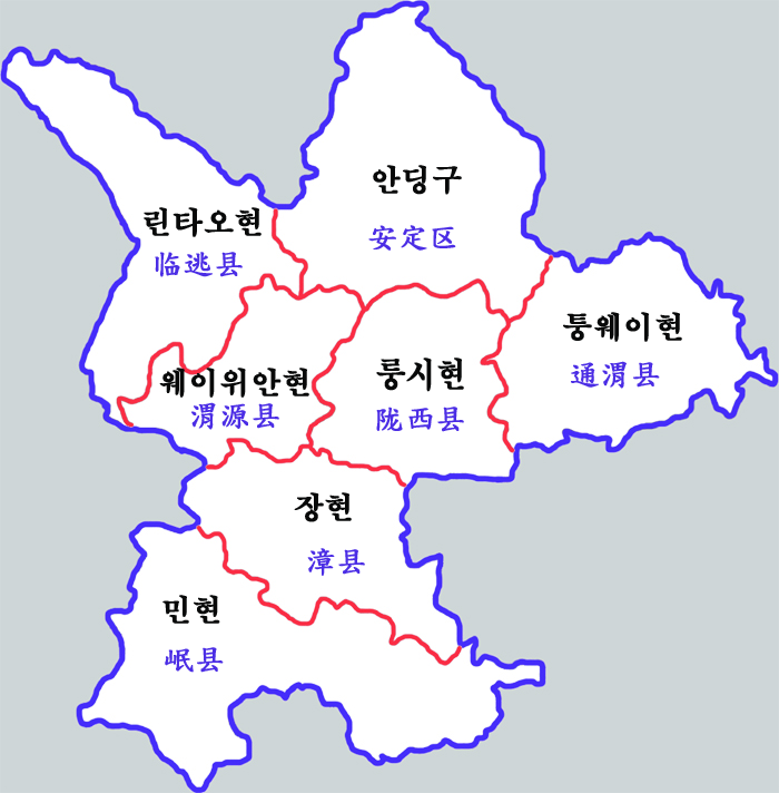 딩시시현급구역도